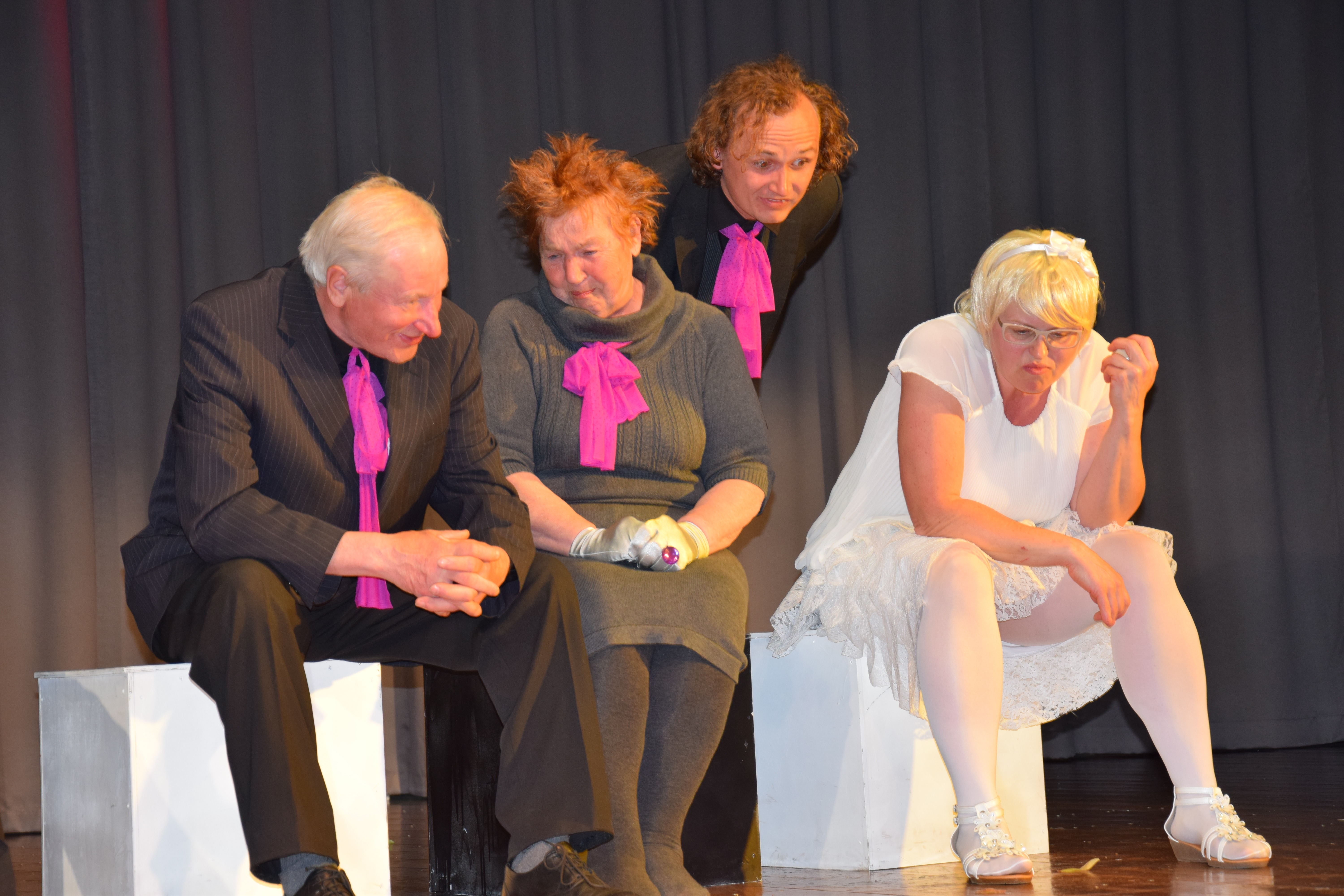 Etendus "Surnud hinged"